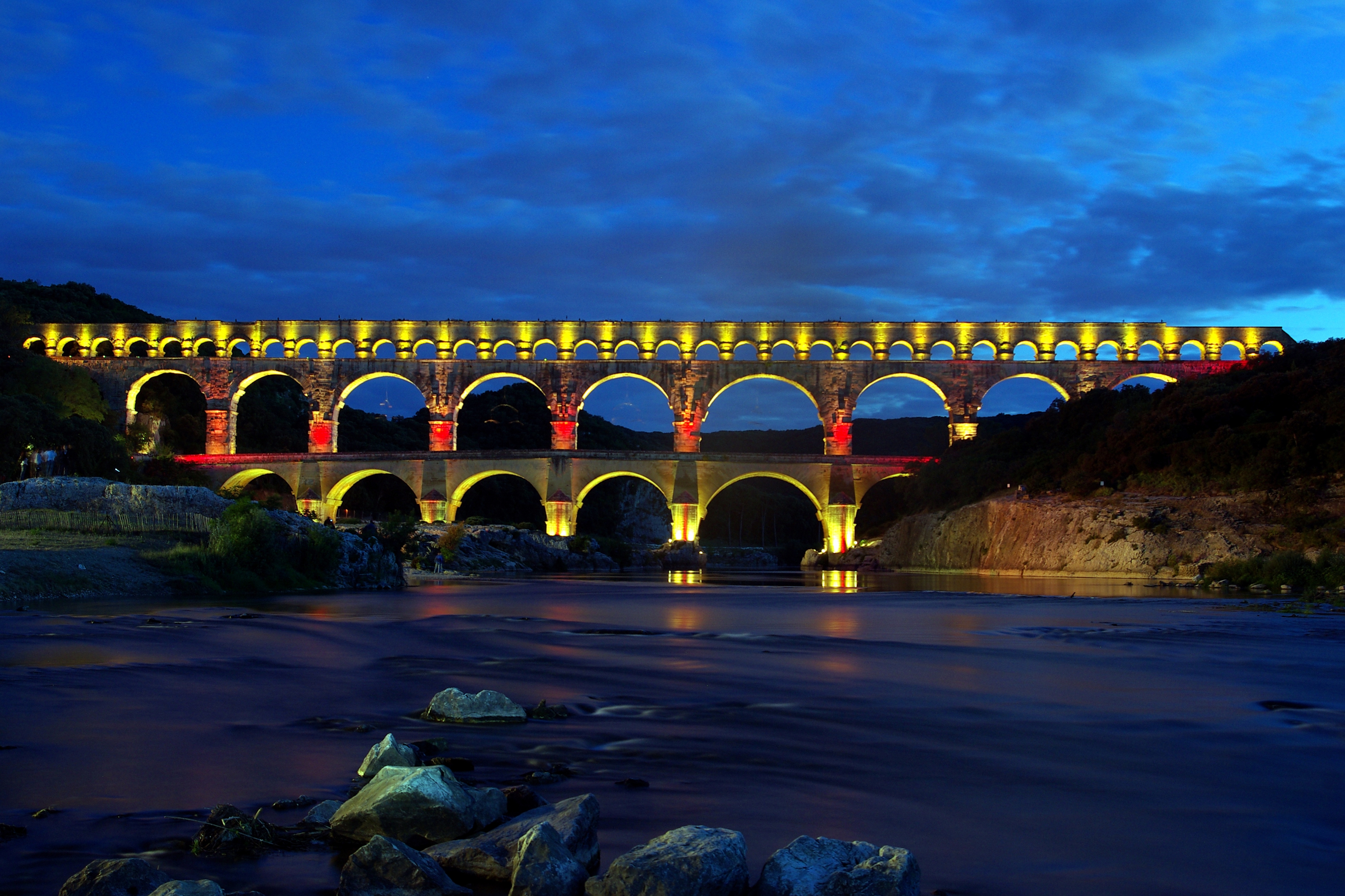 Féerie nocturne au Pont du Gard.